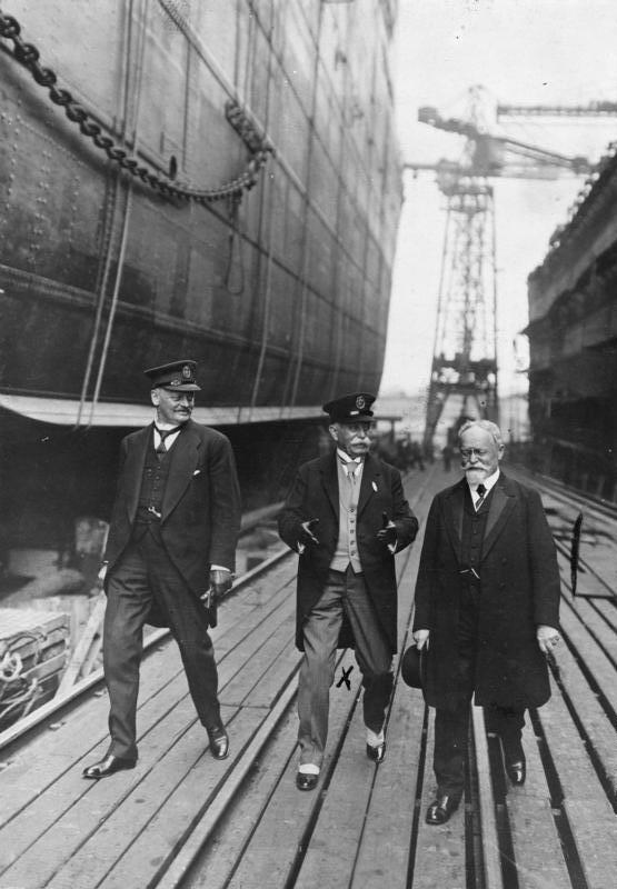 Vom Stapellauf des neuen Lloyddampfers "Zeppelin" auf der Bremer Vulkanwerft in Vegesack. vlnr.: Dr. Philipp Heineken, Präsident des Norddeutschen Lloyd, Ferdinand Graf Zeppelin und Direktor Nawatzki besichtigen das Schiff